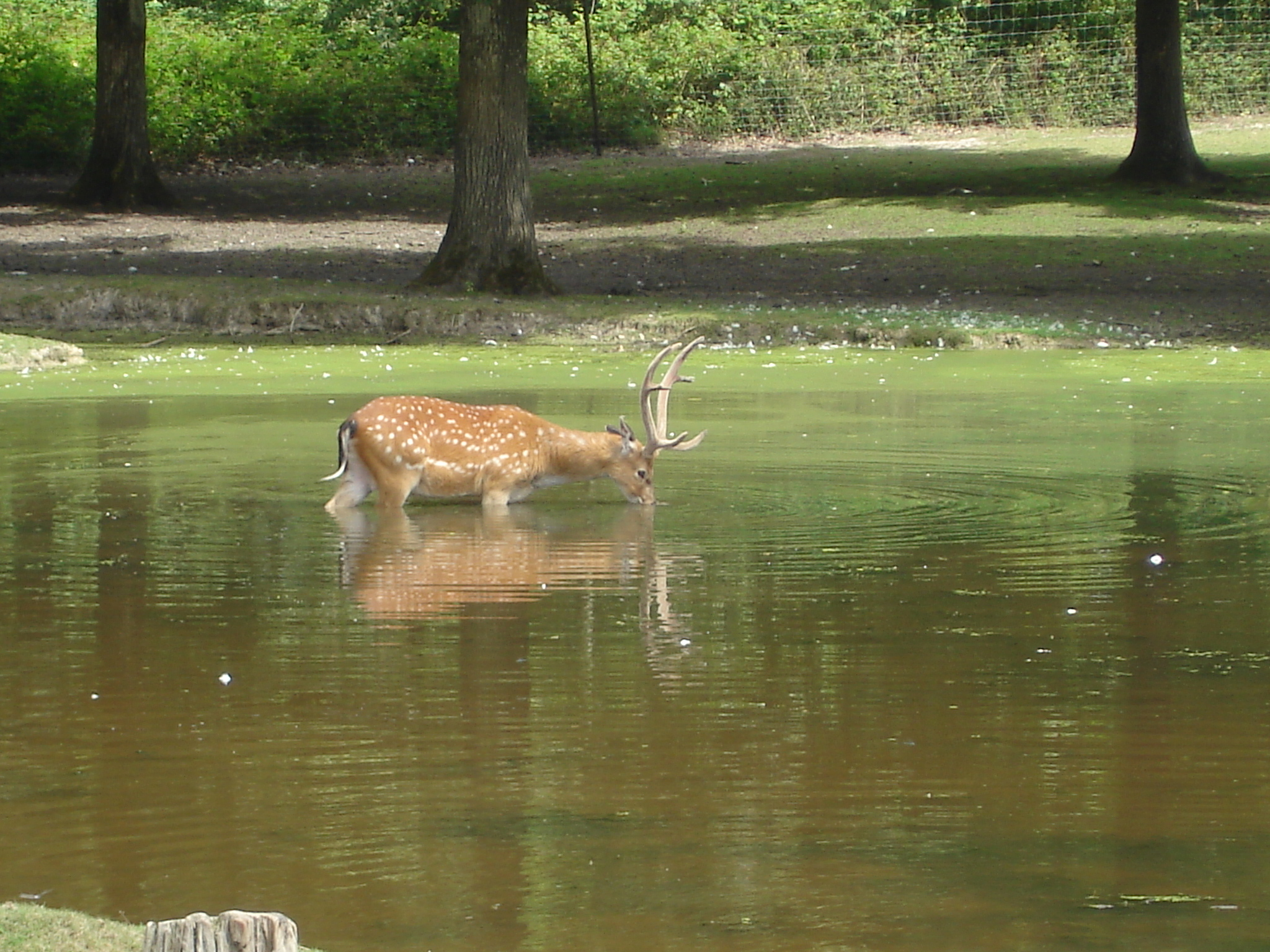 Réserve de la Haute-Touche (36) : Le jeune daim.